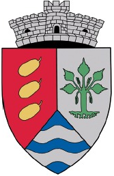 Stema Corni, Botoșani